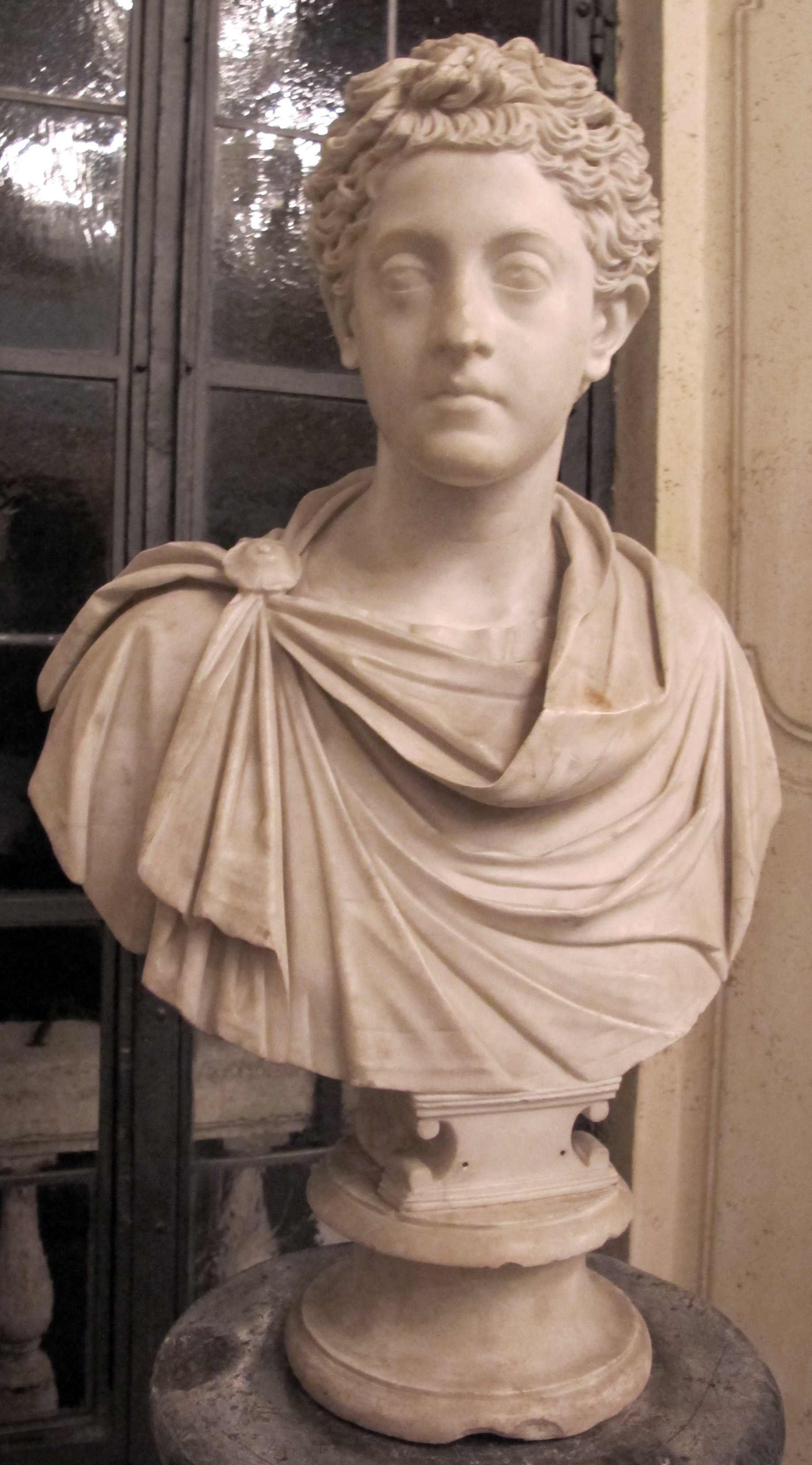 Musei Capitolini